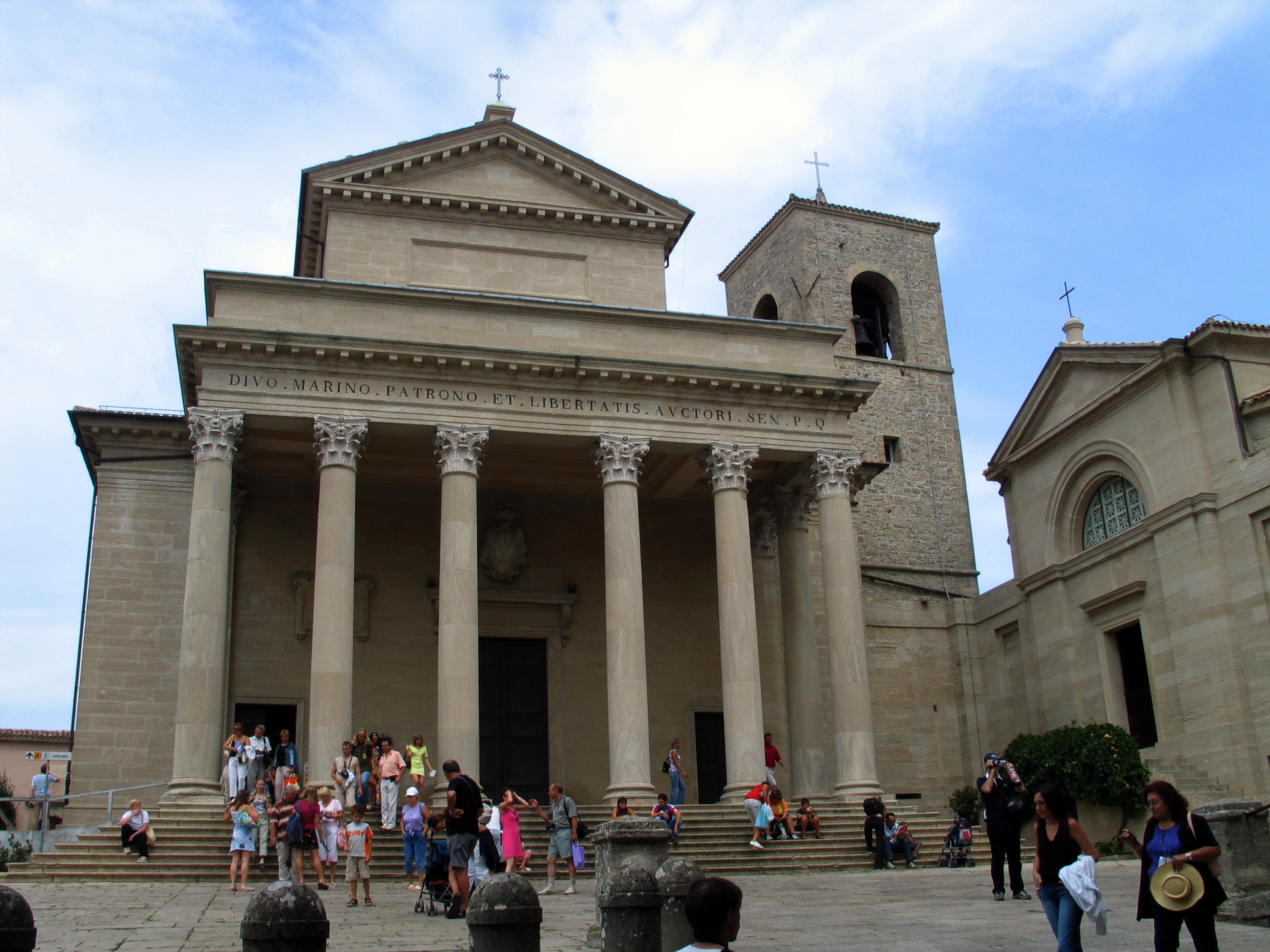 Basilica del Santo, San Marino, 19th century